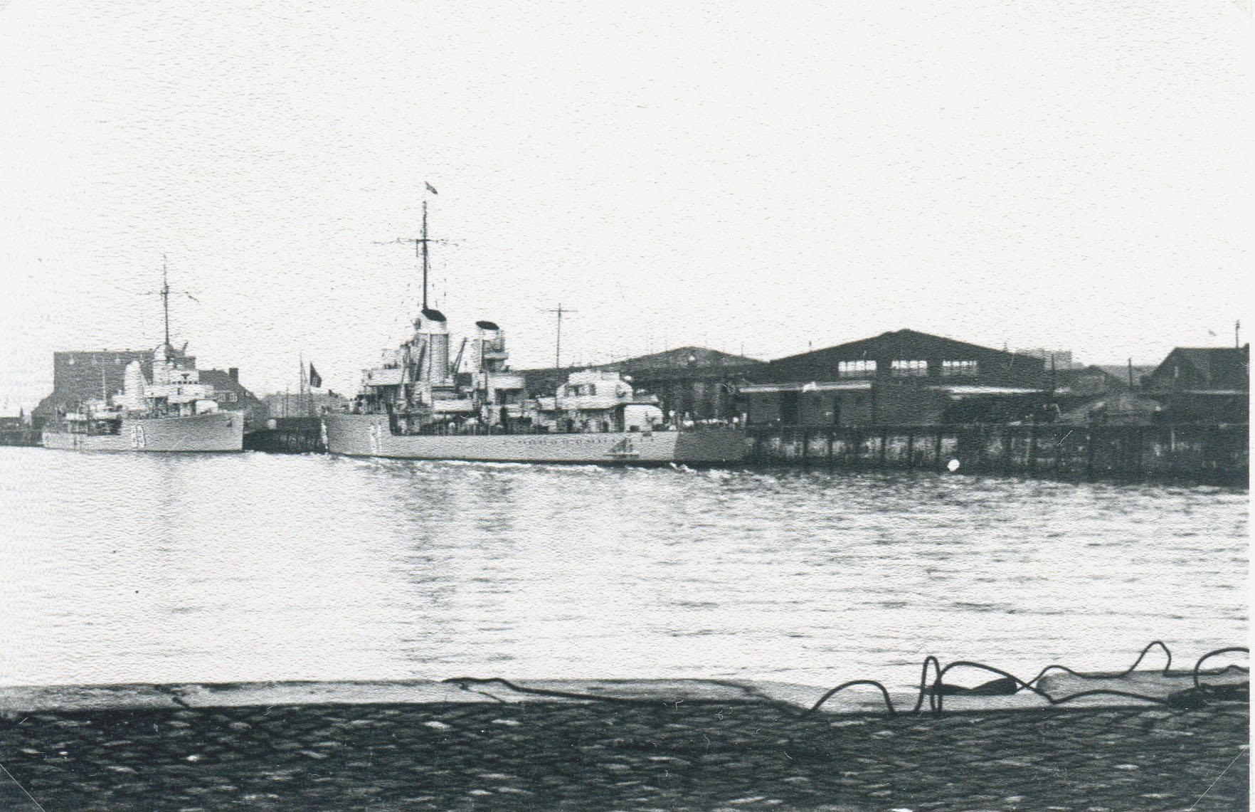 Zerstörer 1934 Z 11 Bernd von Arnim und Wolfgang Zenker an der Zerstörerkaje in Bremerhaven.